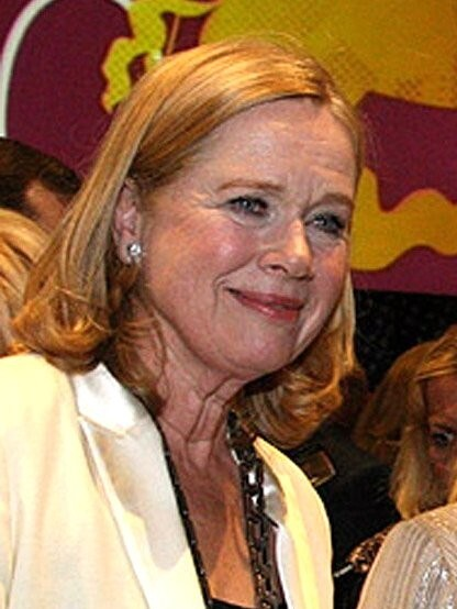 Лив Ульман